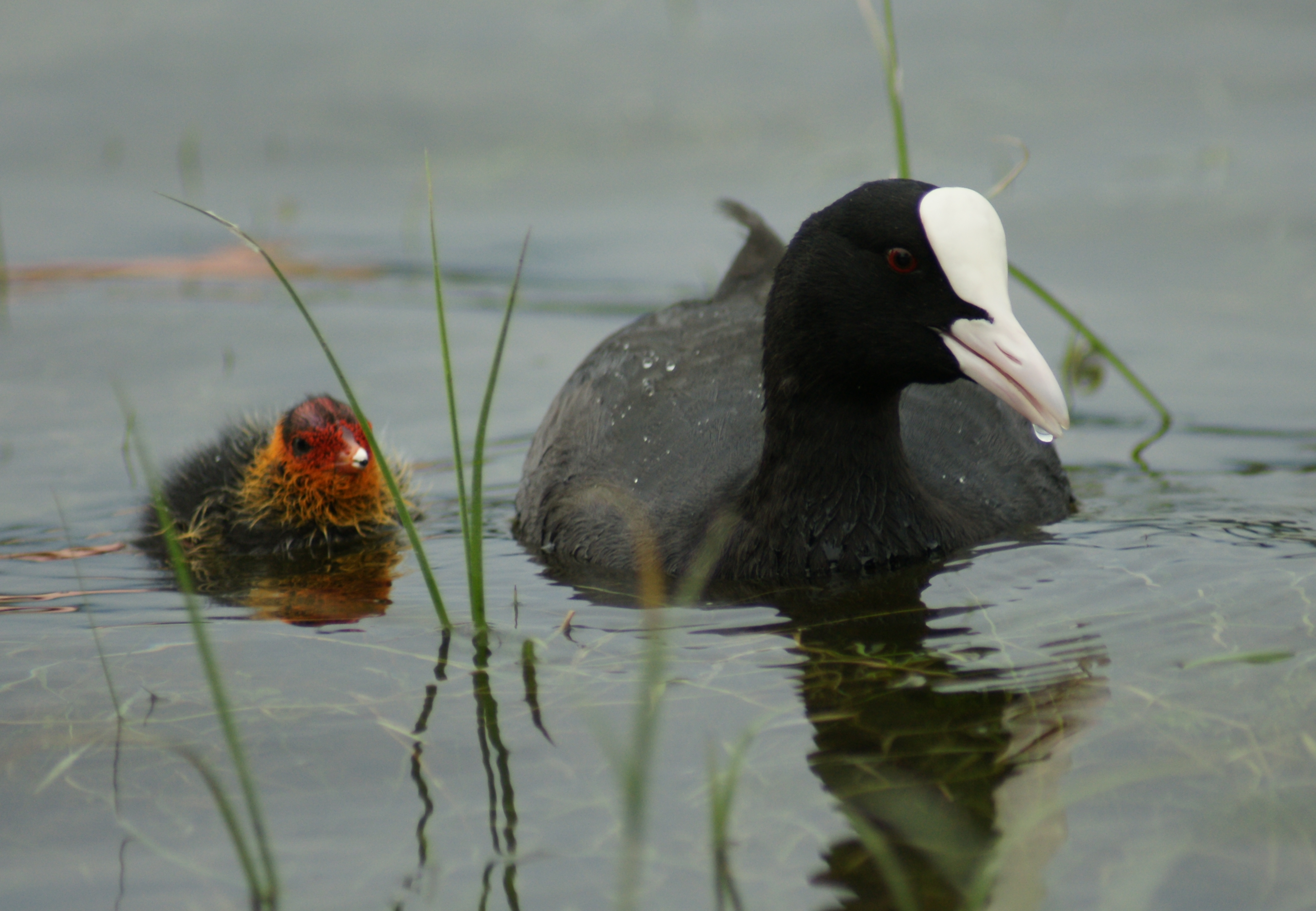 Das Blässhuhn (Fulica atra) ist eine Art aus der Familie der Rallenvögel. Gesehen im Harder Strandbad am Bodensee.